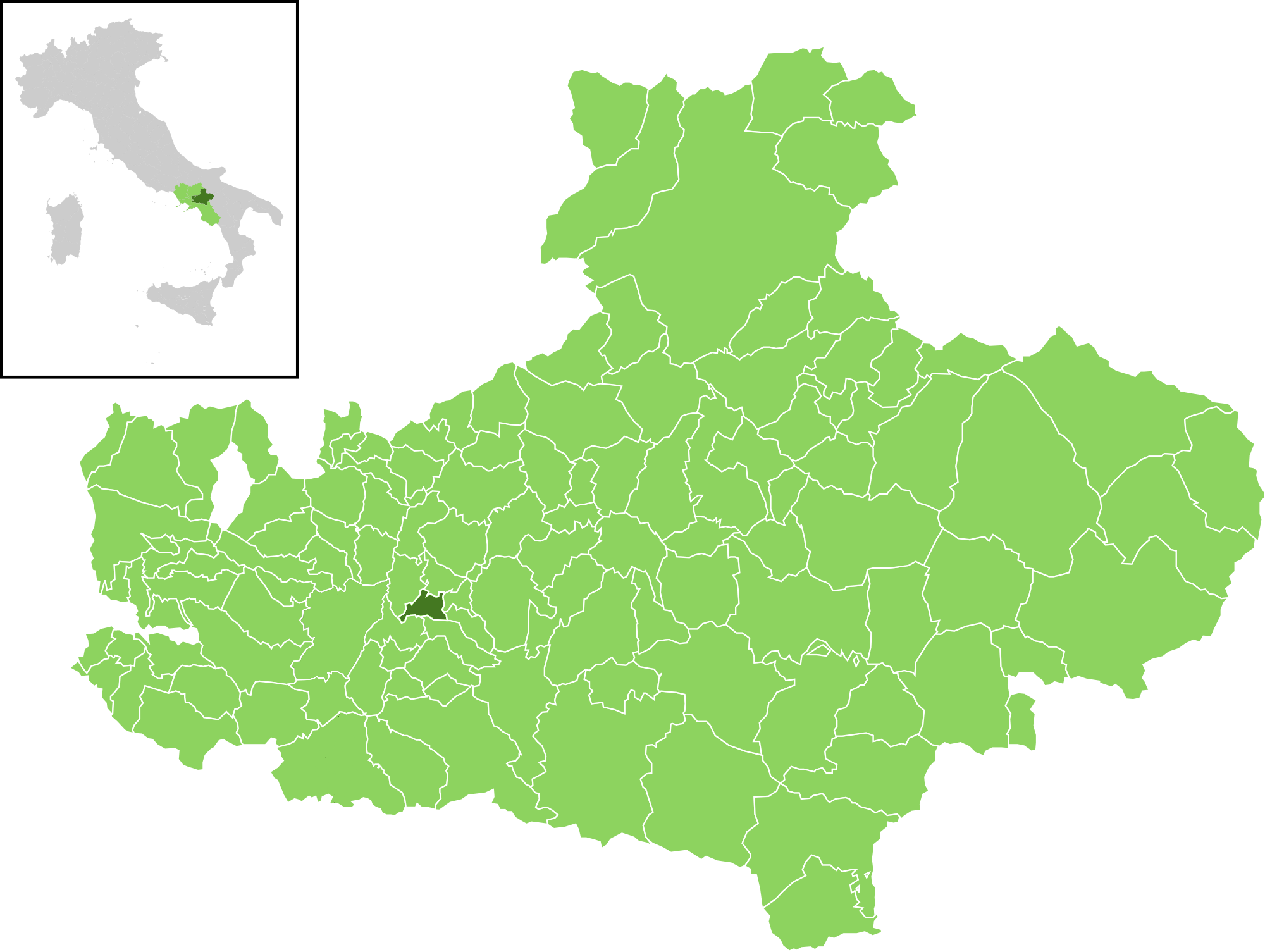 Posizione del comune all'interno della provincia di Avellino